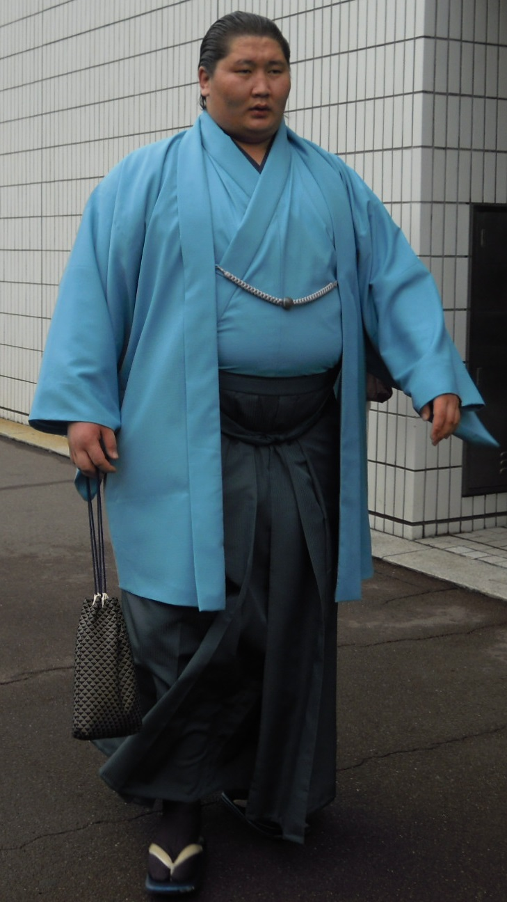 平成26年五月場所3日目、国技館入りする逸ノ城関